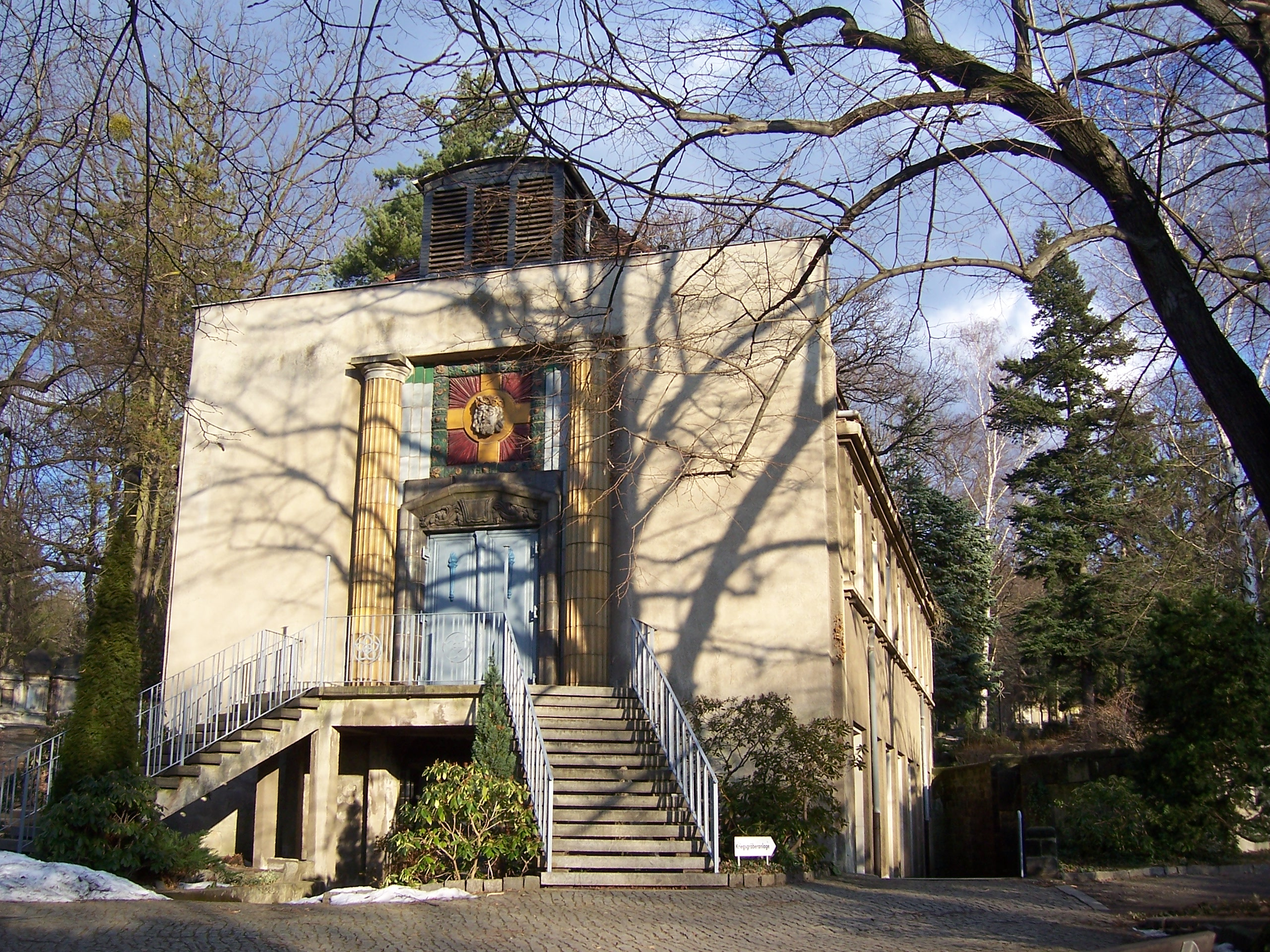 Leichenhalle von Schilling & Graebner (1911) auf dem St.-Pauli-Friedhof in Dresden